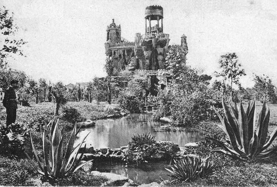 La Gruta de Plaza Constitución, en Buenos Aires. Estaba cerca del cruce de las calles Lima Oeste con Pavón, fue construida hacia 1885 y demolida en 1914.